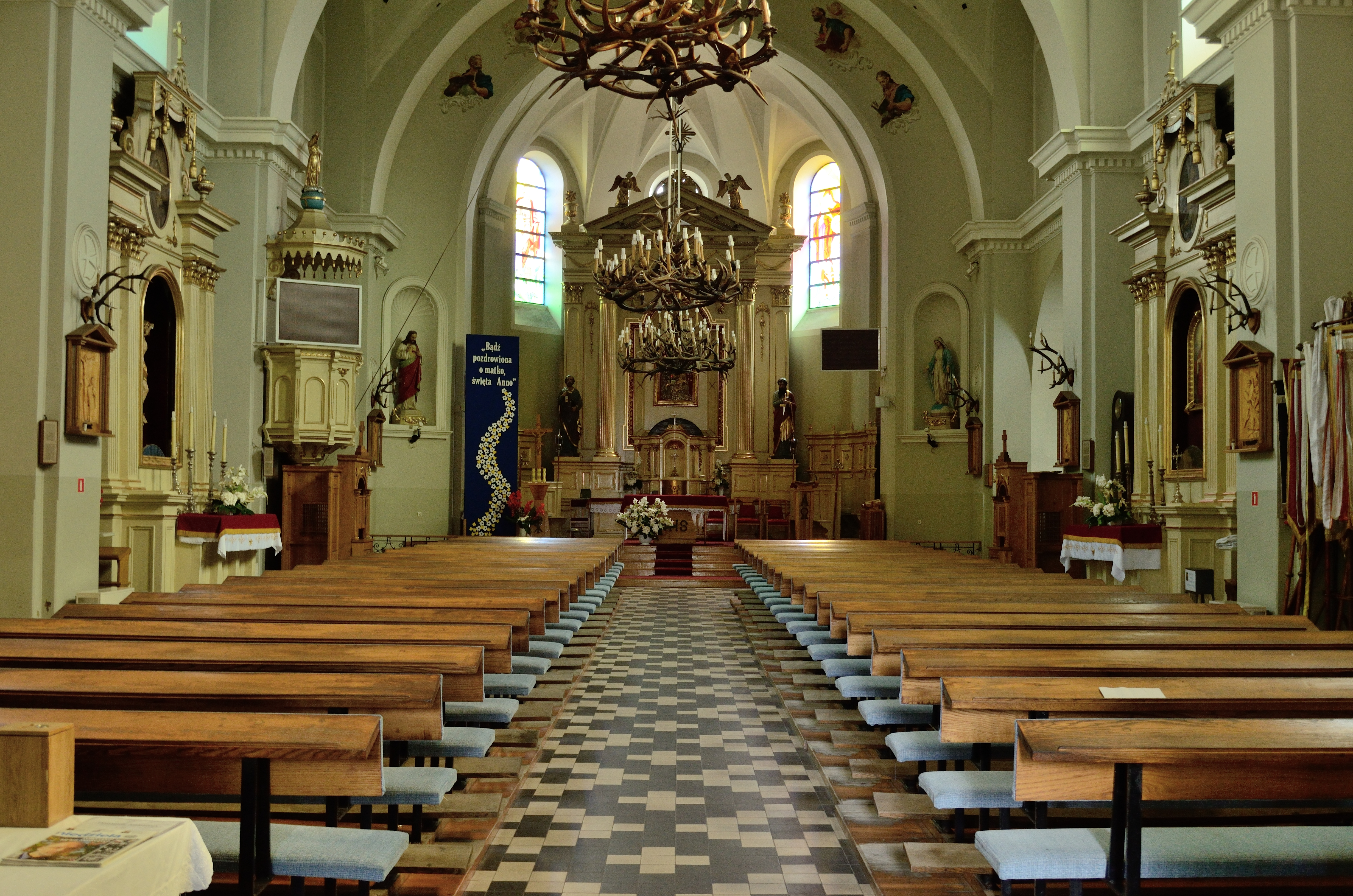 Kościół Niepokalanego Poczęcia NMP